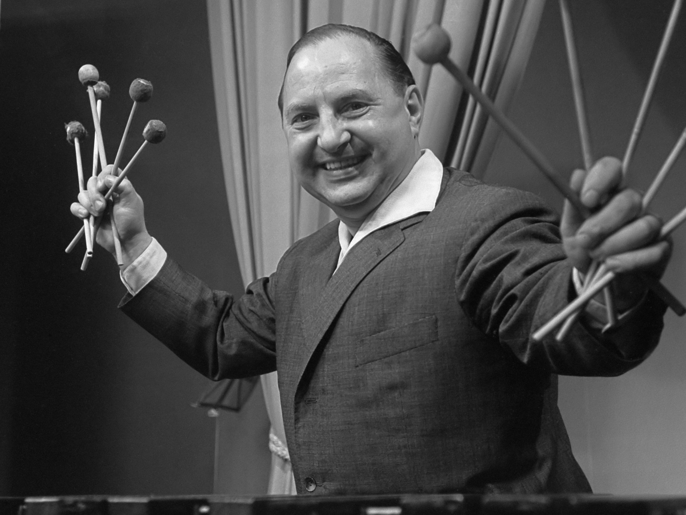 Laatste maal in dit seizoen de "Bruce Low" show. Kurt Engel 19 april 1961